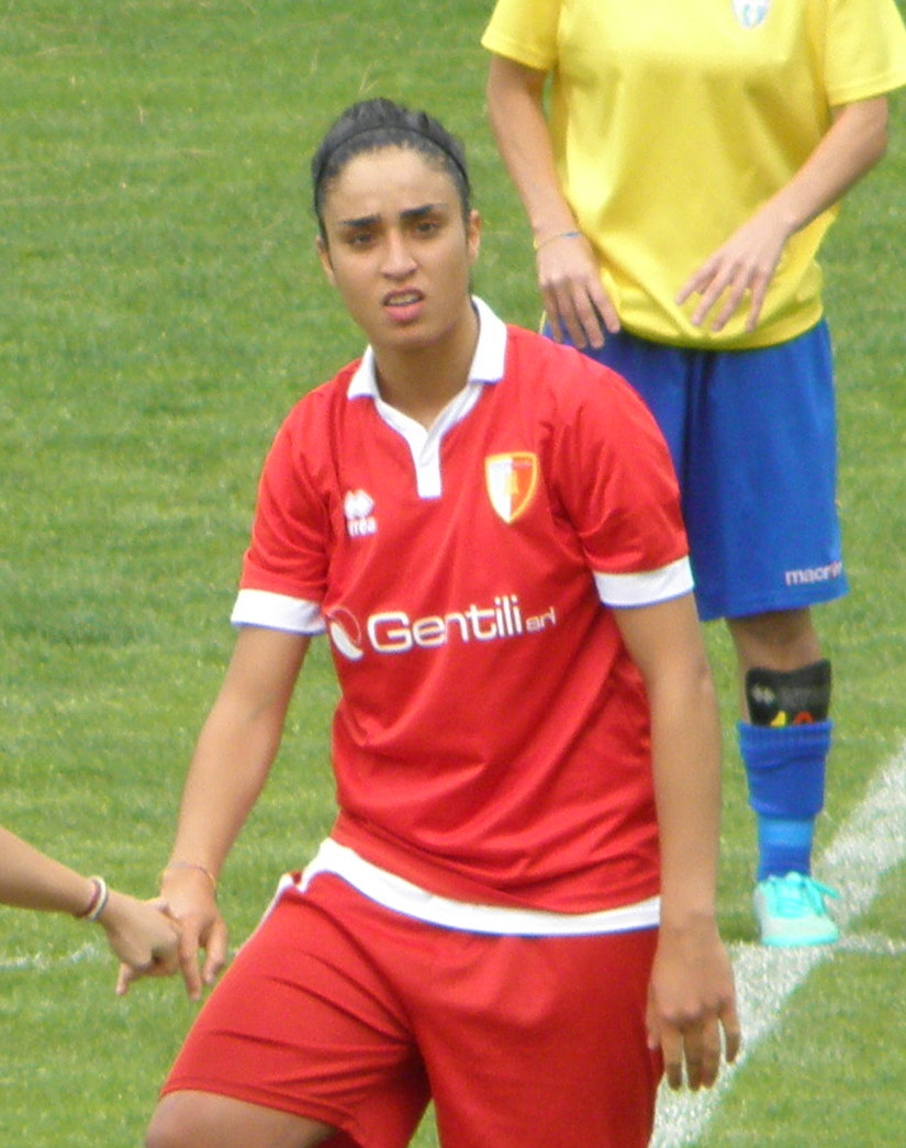 Milano Marittima (Cervia), stadio Germano Todoli, 16 maggio 2015. Riviera di Romagna - San Zaccaria 1-2, play-out del campionato italiano di Serie A di calcio femminile 2014-15: Martina Piemonte.